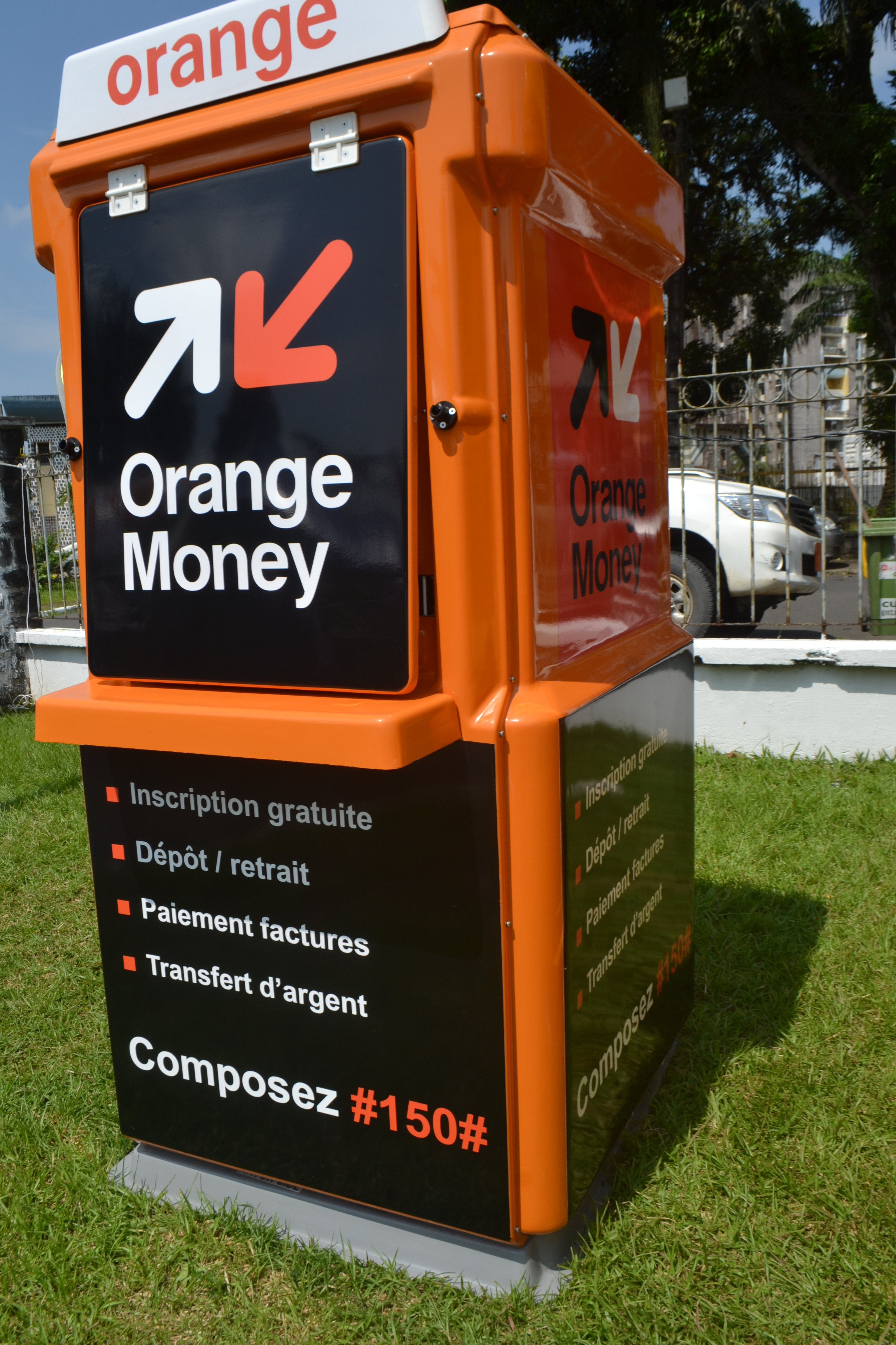 Koisque Orange Money Cameroun